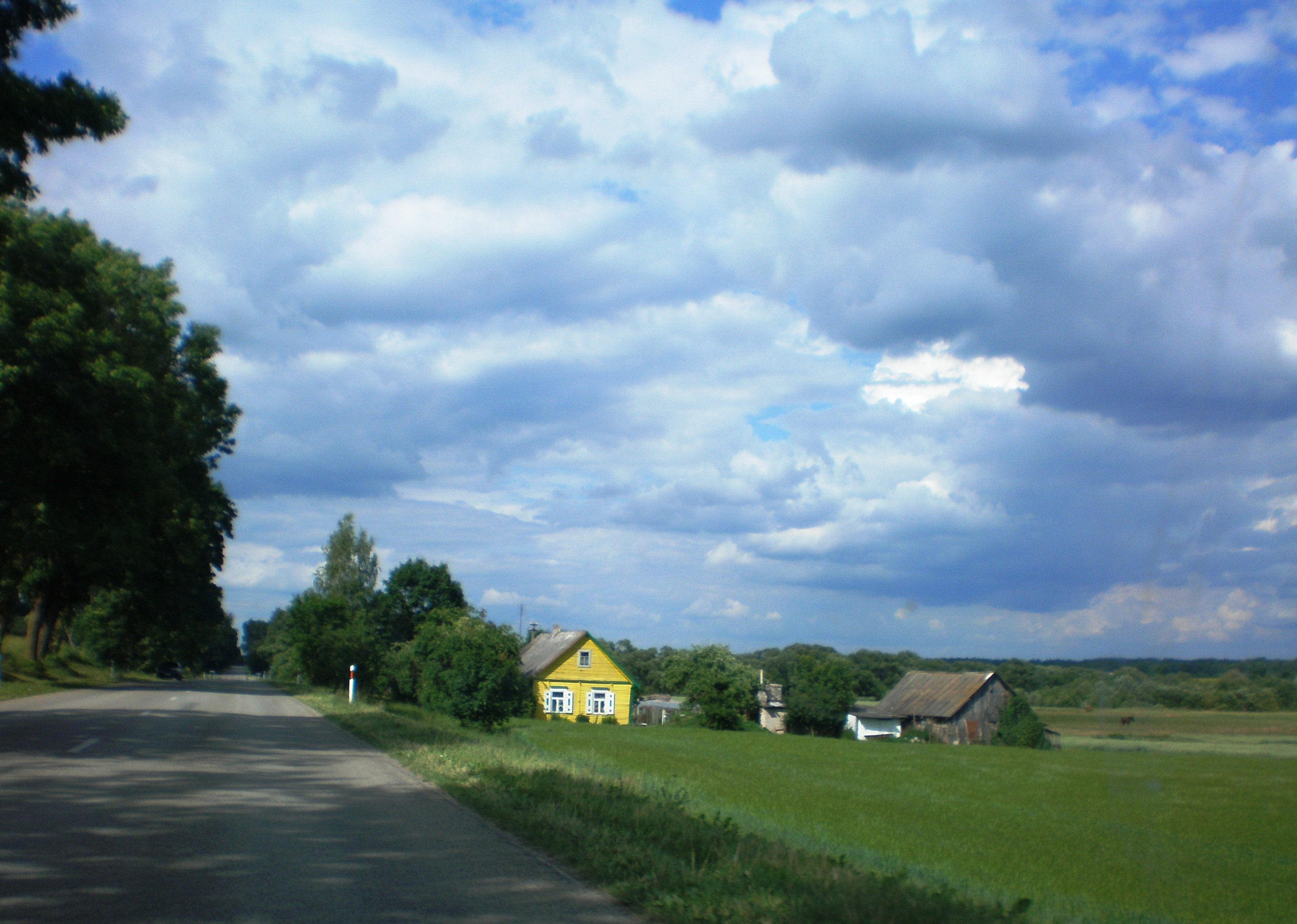 Stuomeniškiai village, Panevėžys district